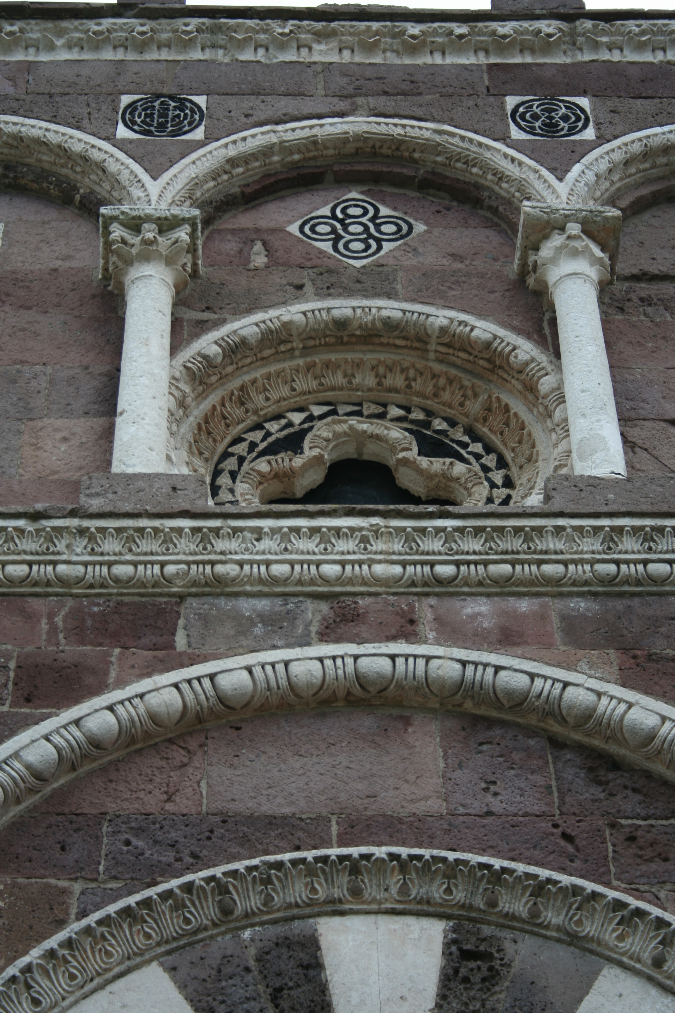 Chiesa di Nostra Signora di Tergu (SS)